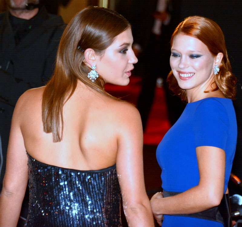 Léa Seydoux et Adèle Exarchopoulos à la cérémonie des César